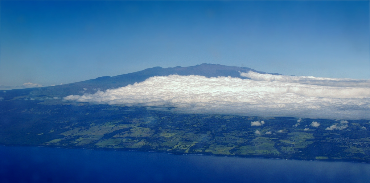 Иллюстрация для викиучебника Гавайеведение